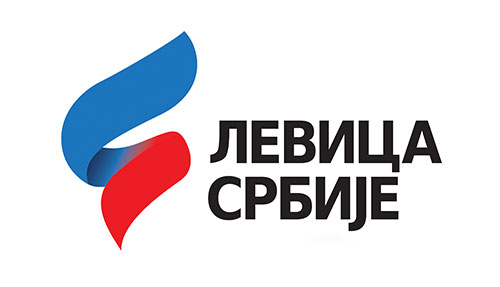 лого Левице Србије